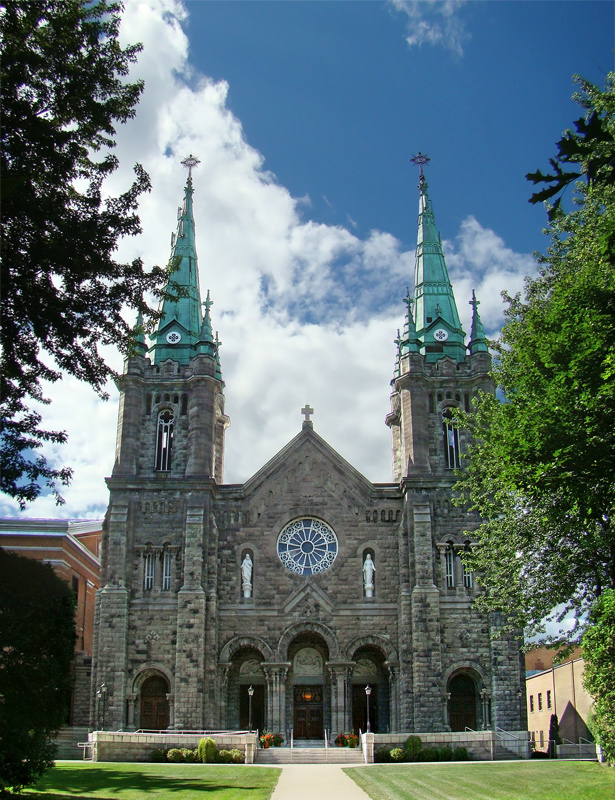 Cathédrale Saint-Hyacinthe-le-Confesseur, Saint-Hyacinthe, Montérégie, Québec, Canada.